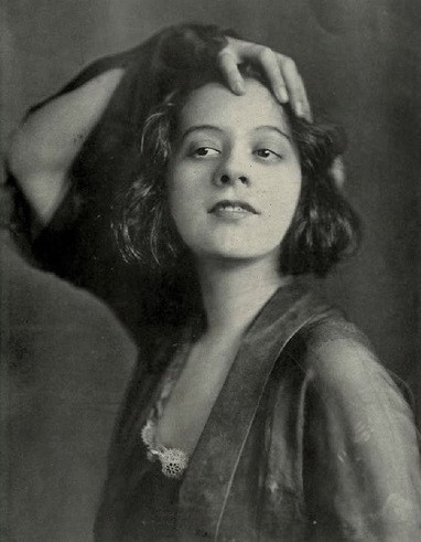 Lenore Ulric